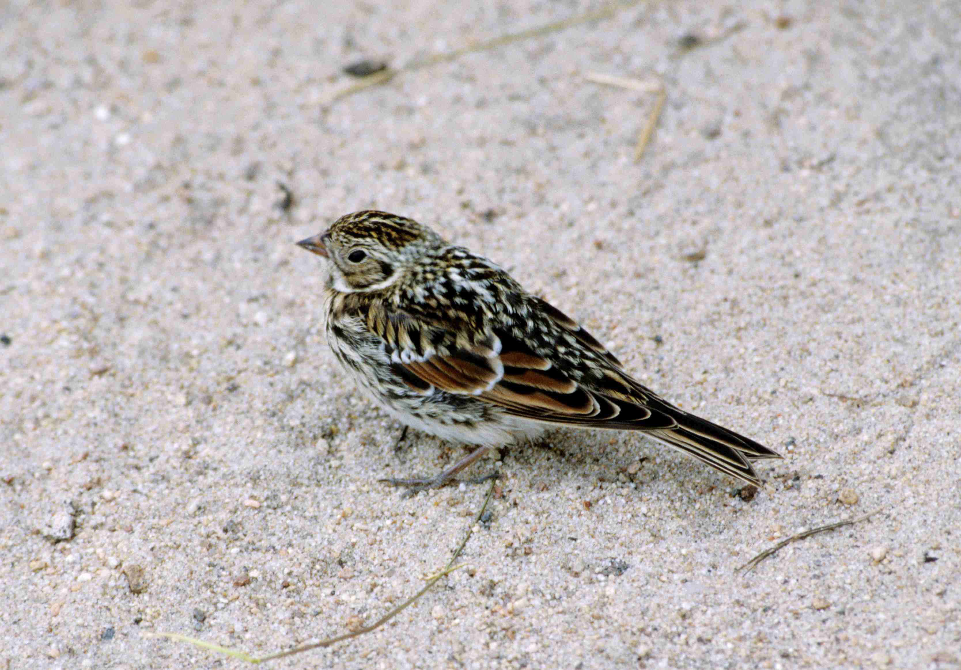 Young female Lapland Longspur, Calcarius lapponicus, near Wager Bay (Ukkusiksalik National Park, Nunavut, Canada)